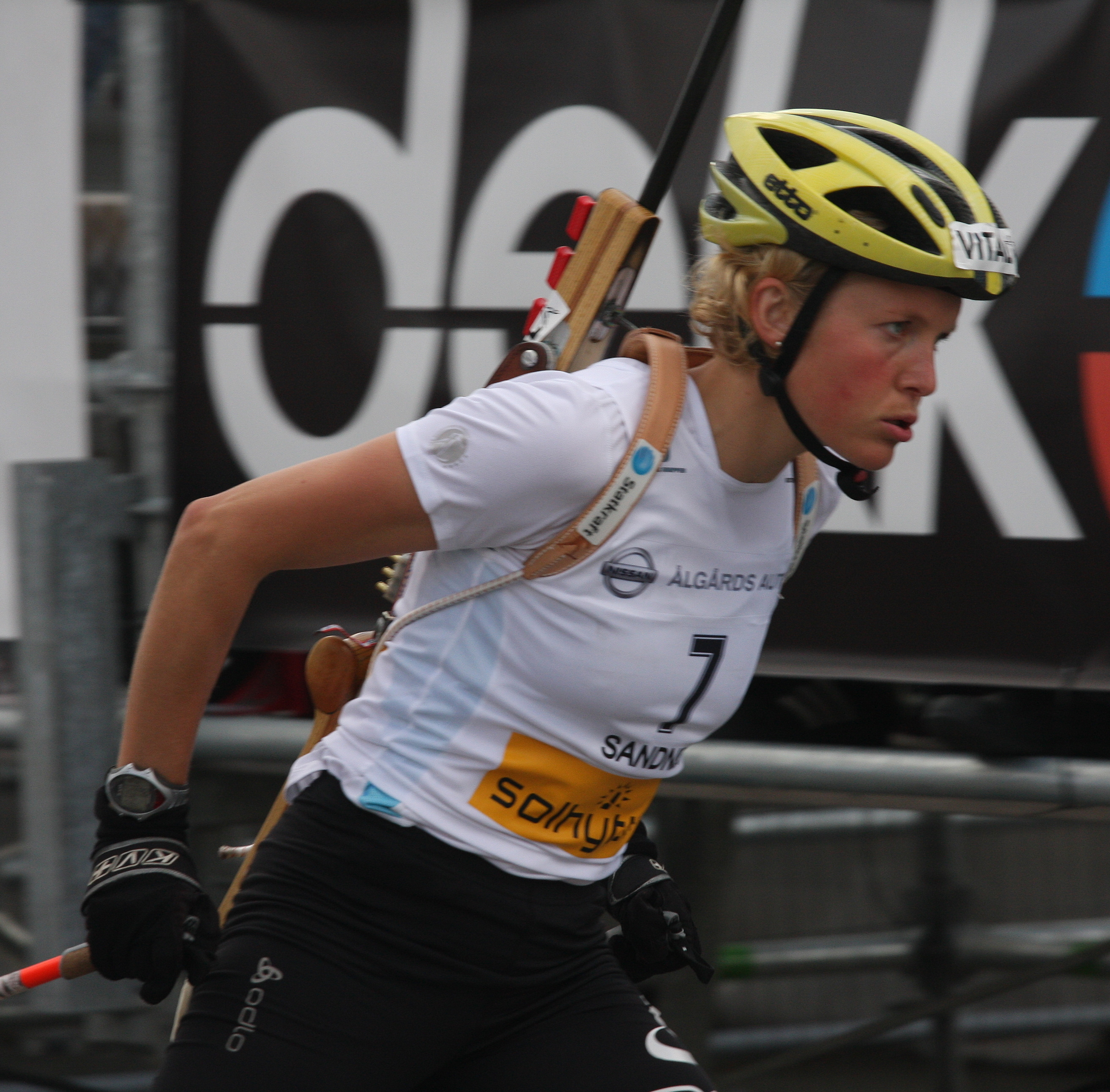 Solveig Rogstad under Blinkfestivalen i Sandnes 2009